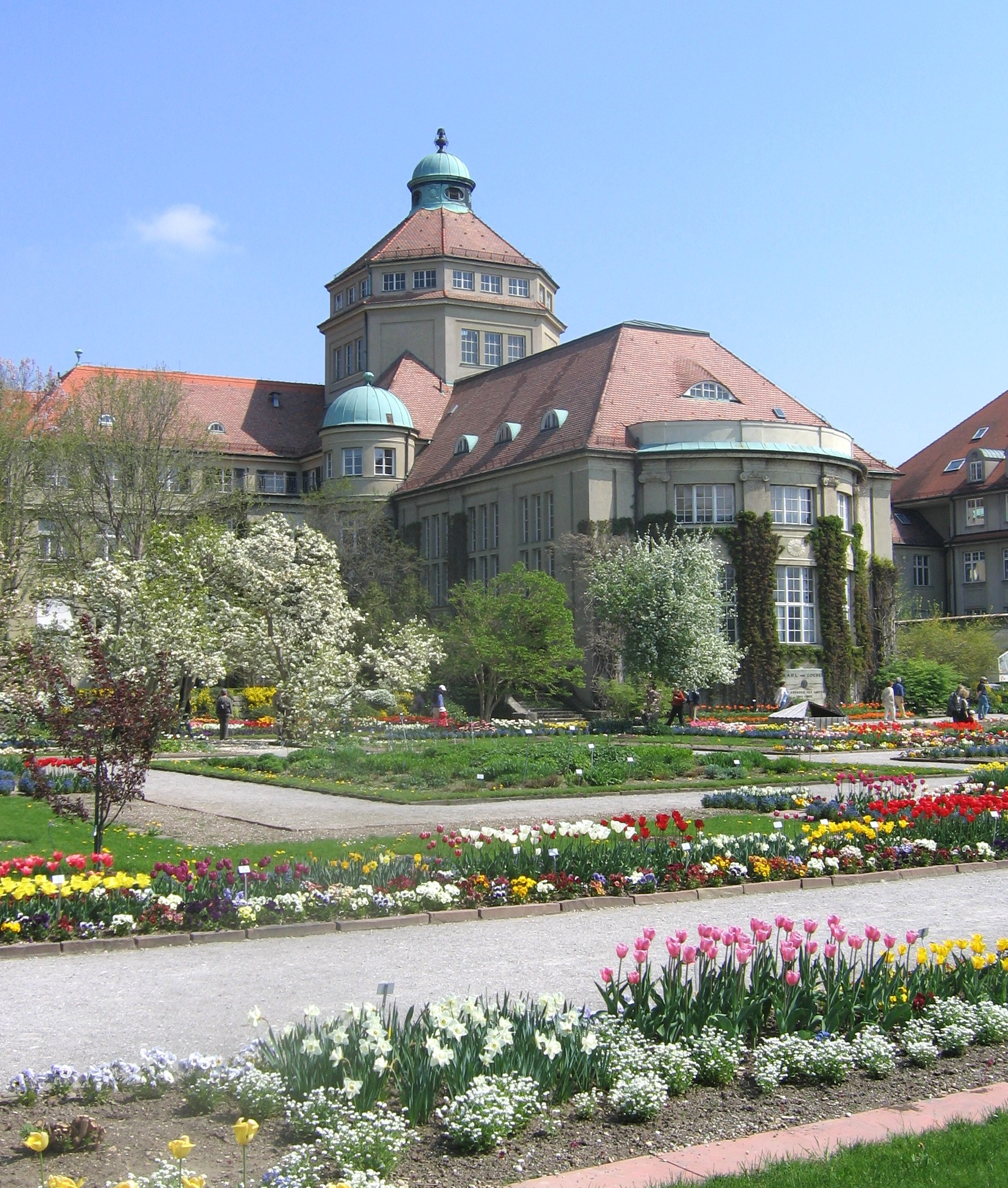 Botanischer Garten in München